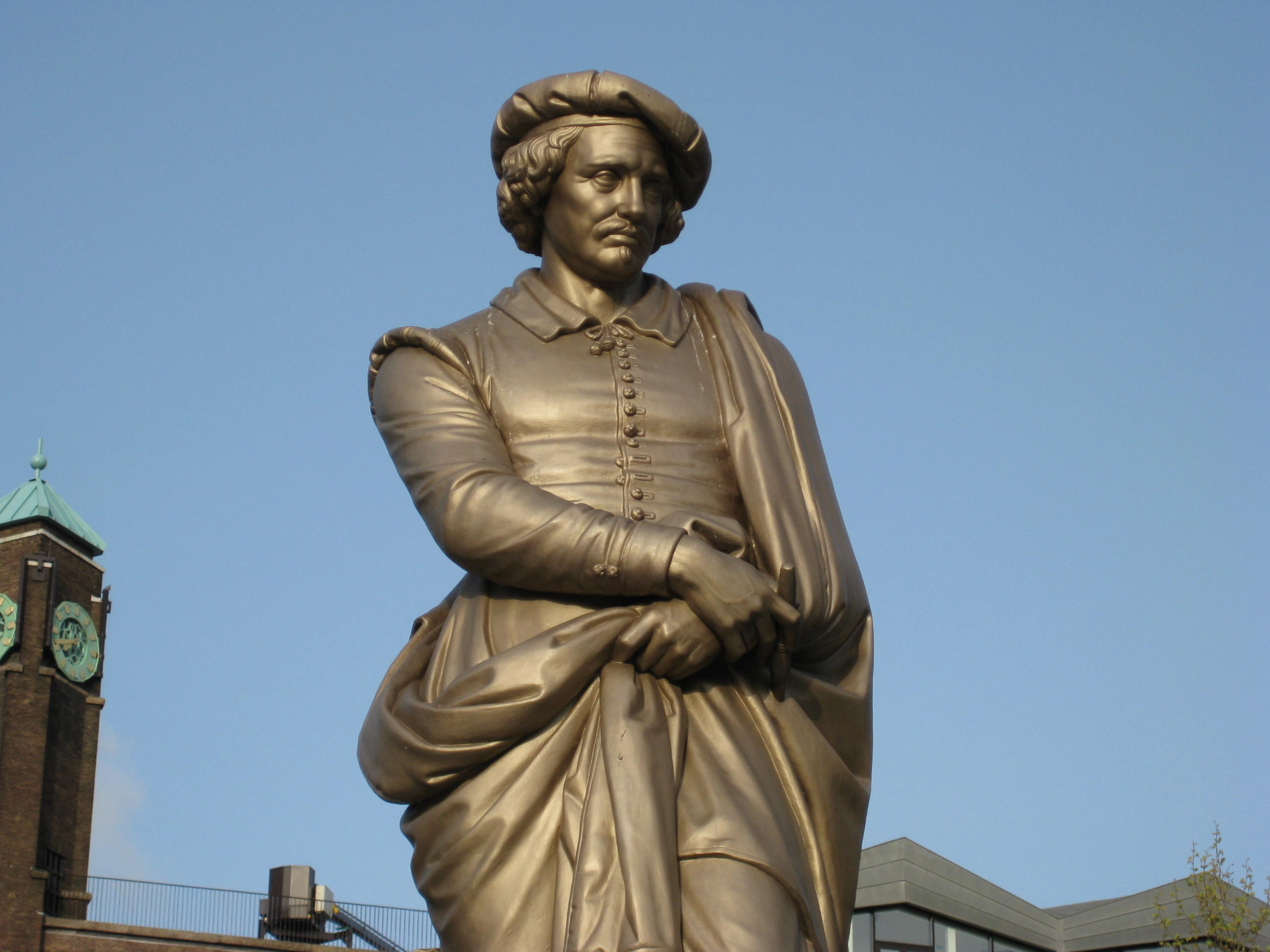 Het standbeeld van Rembrandt op het vernieuwde Rembrandtplein in Amsterdam